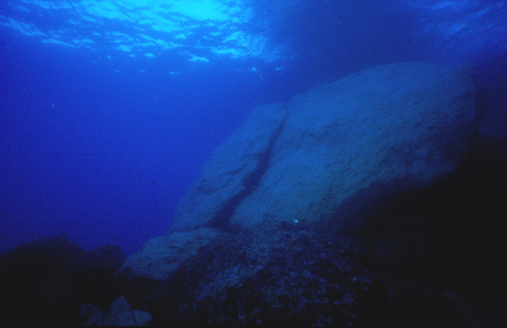 Fels Azure Window